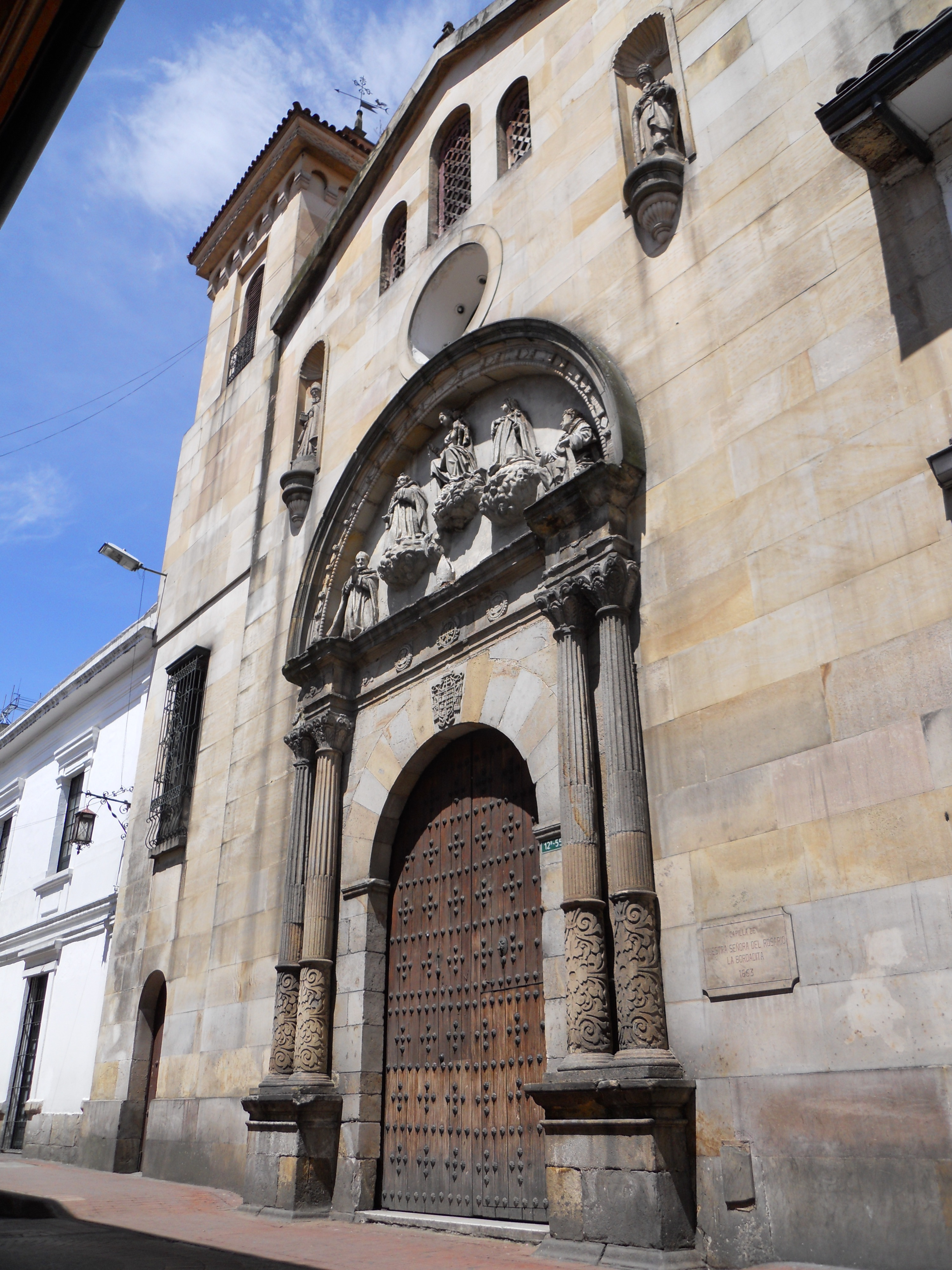 Iglesia de la Bordadita, carrera 12 con calle 5, La Candelaria, centro de Bogotá.